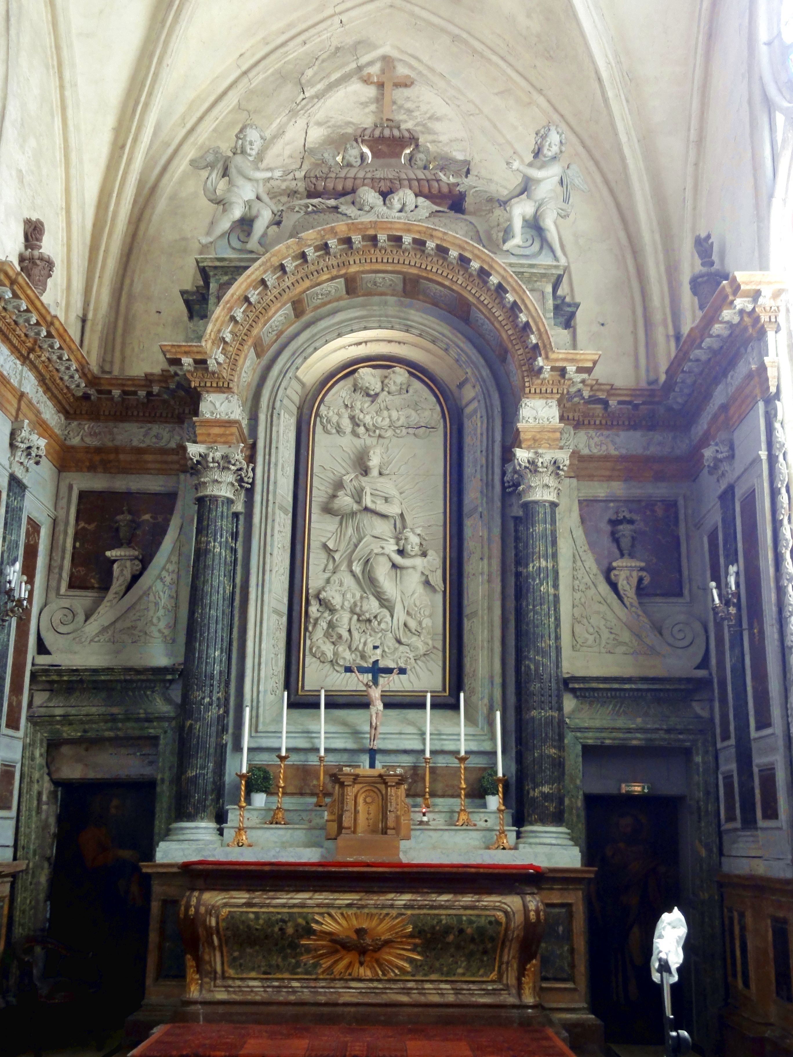 Retable du maître-autel.